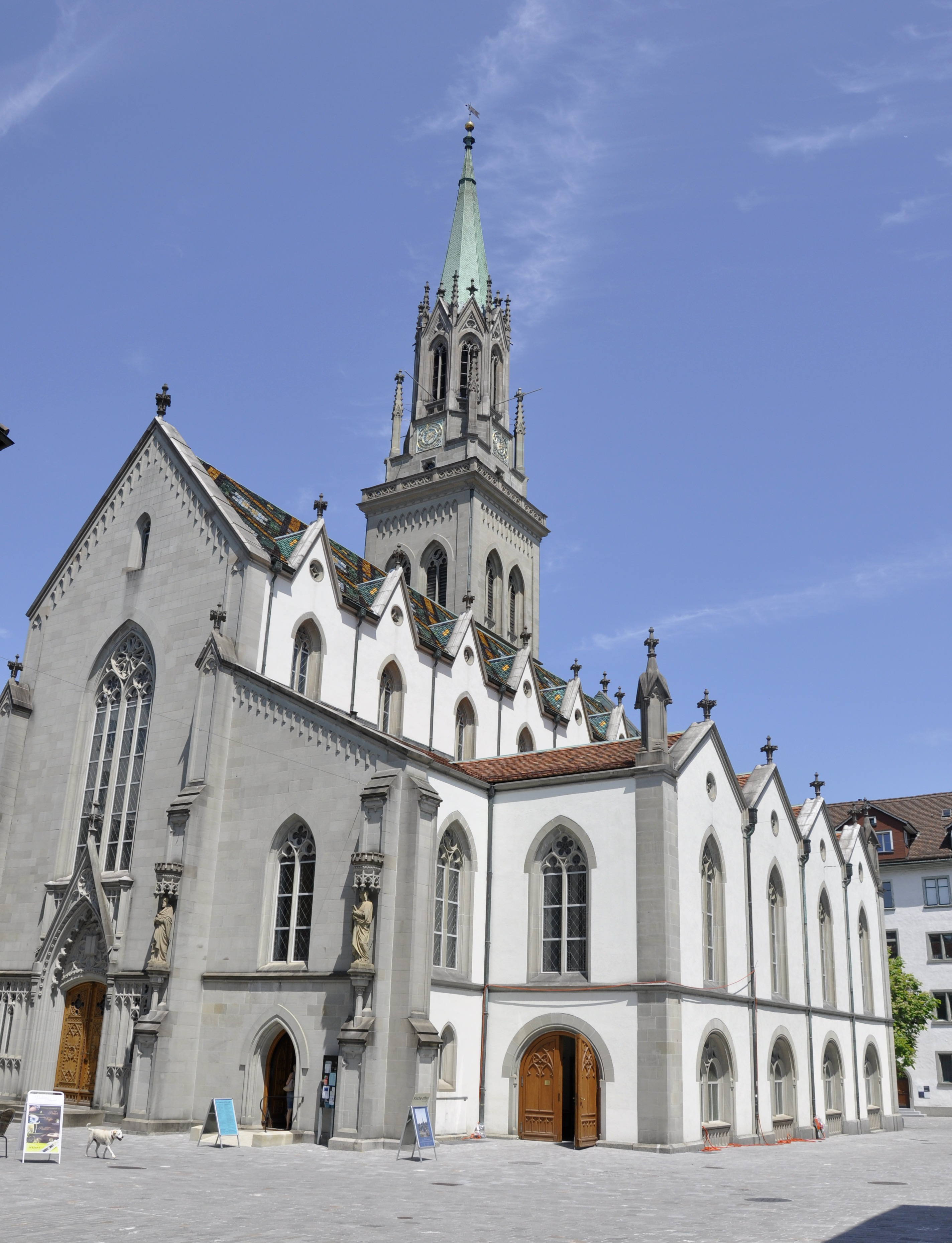 Kirche St. Laurenzen